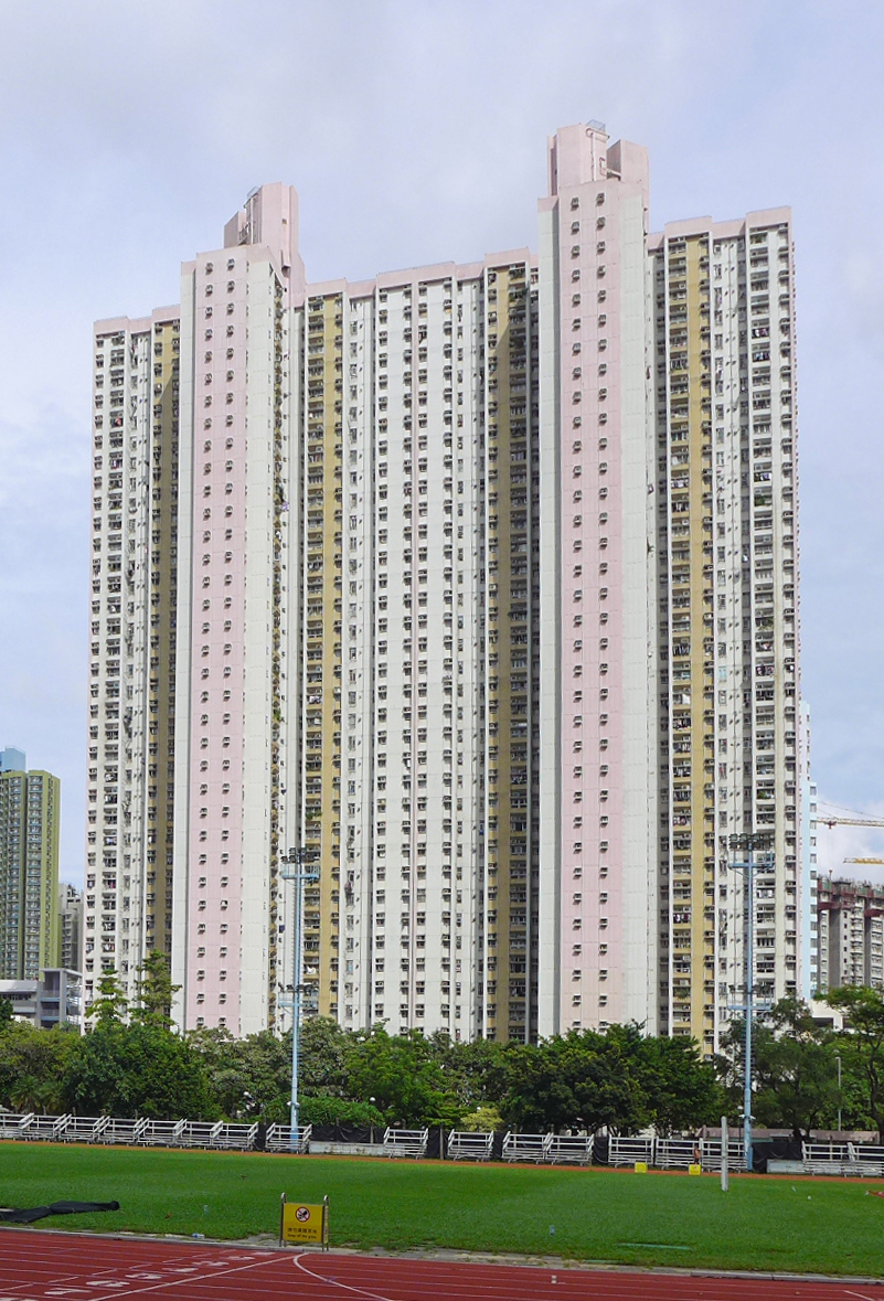 Hang Chun Court